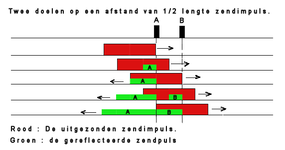 Minimum afstand-radaronderscheidingsvermogen